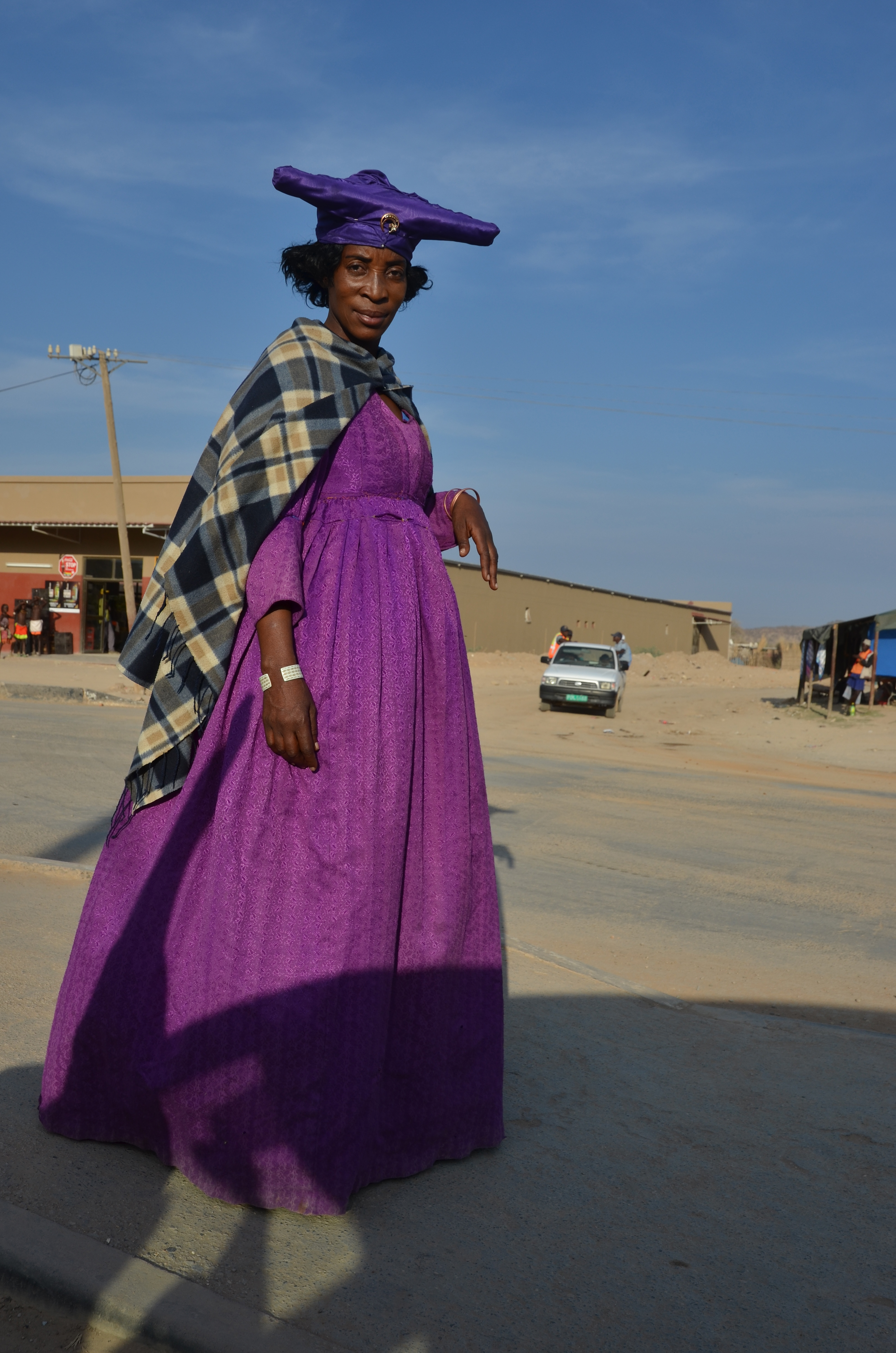 Opuwo, Namibia